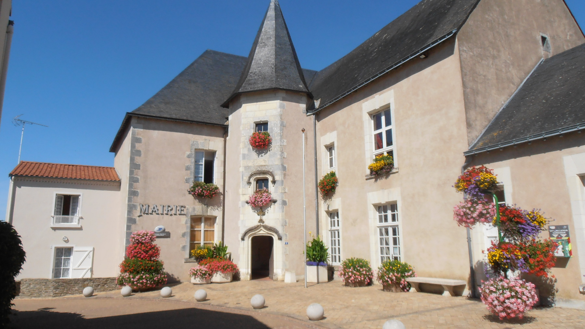 La mairie de Saint-Laurent-du-Mottay (Maine-et-Loire, France).